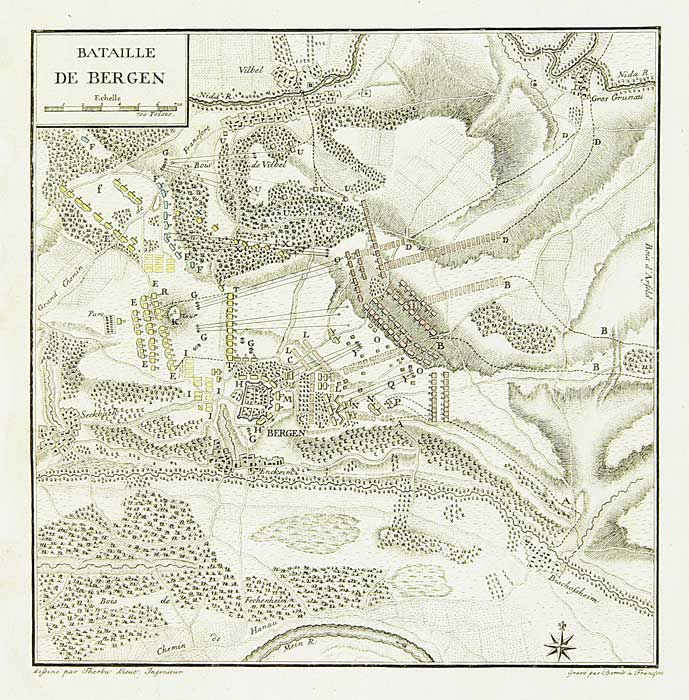 Схема битвы при Бергене